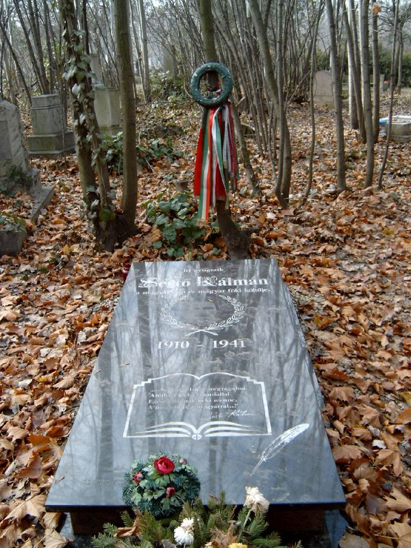 Sértő Kálmán (Bisse, 1910. okt. 29. – Gyalu, 1941 jún. 16.) költő, író sírja Budapesten. Kerepesi temető: 50/1-3-23.